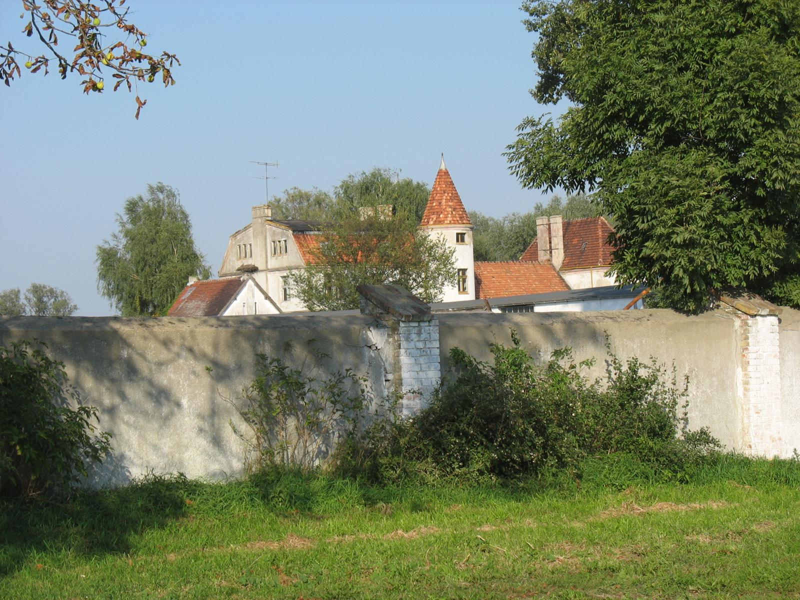 Wojcieszyce. Tzw. pałacyk widziany zza ogrodzenia.